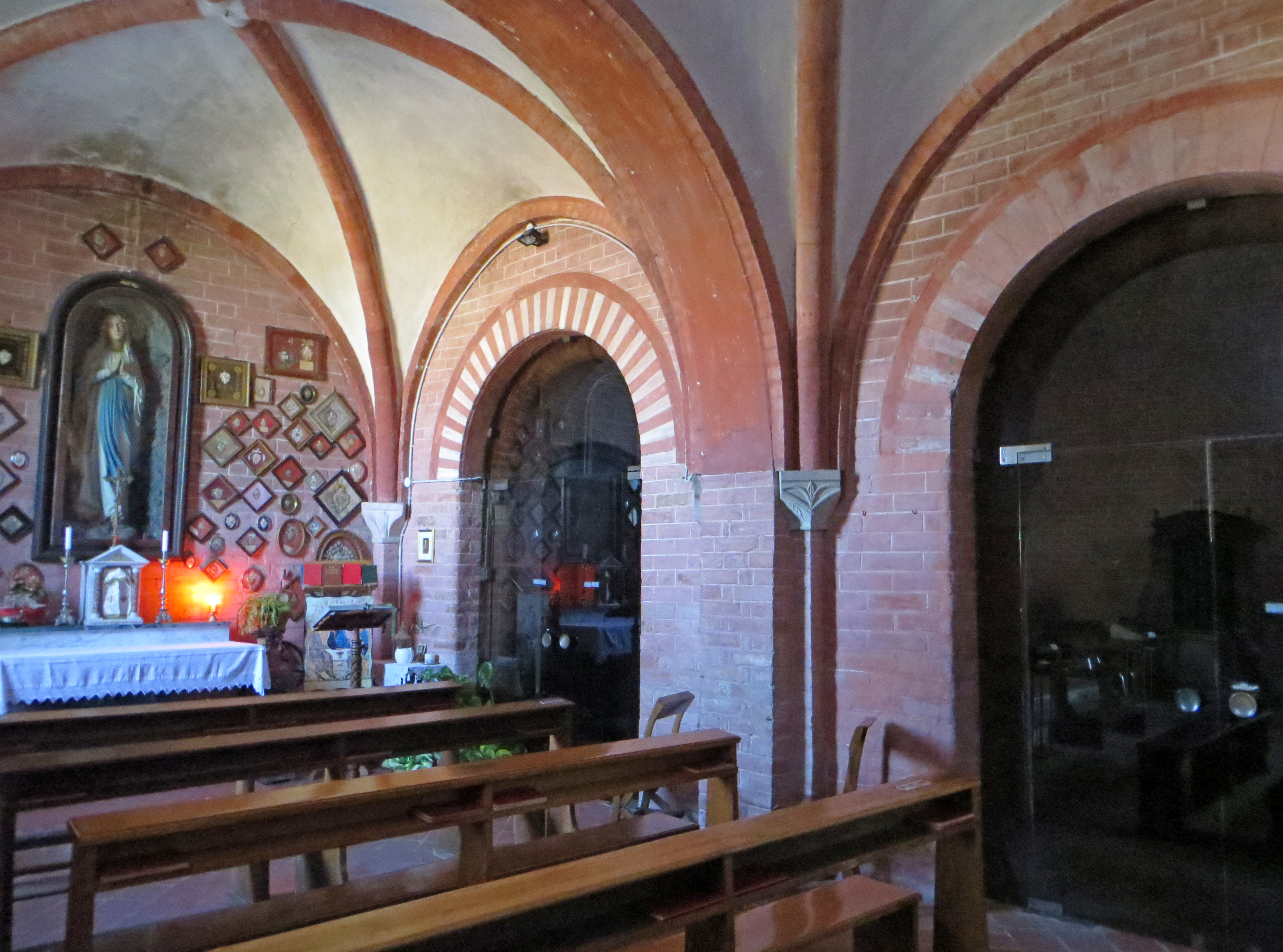 Abbazia di San Bernardo (Fontevivo) - cappella del Sacramento